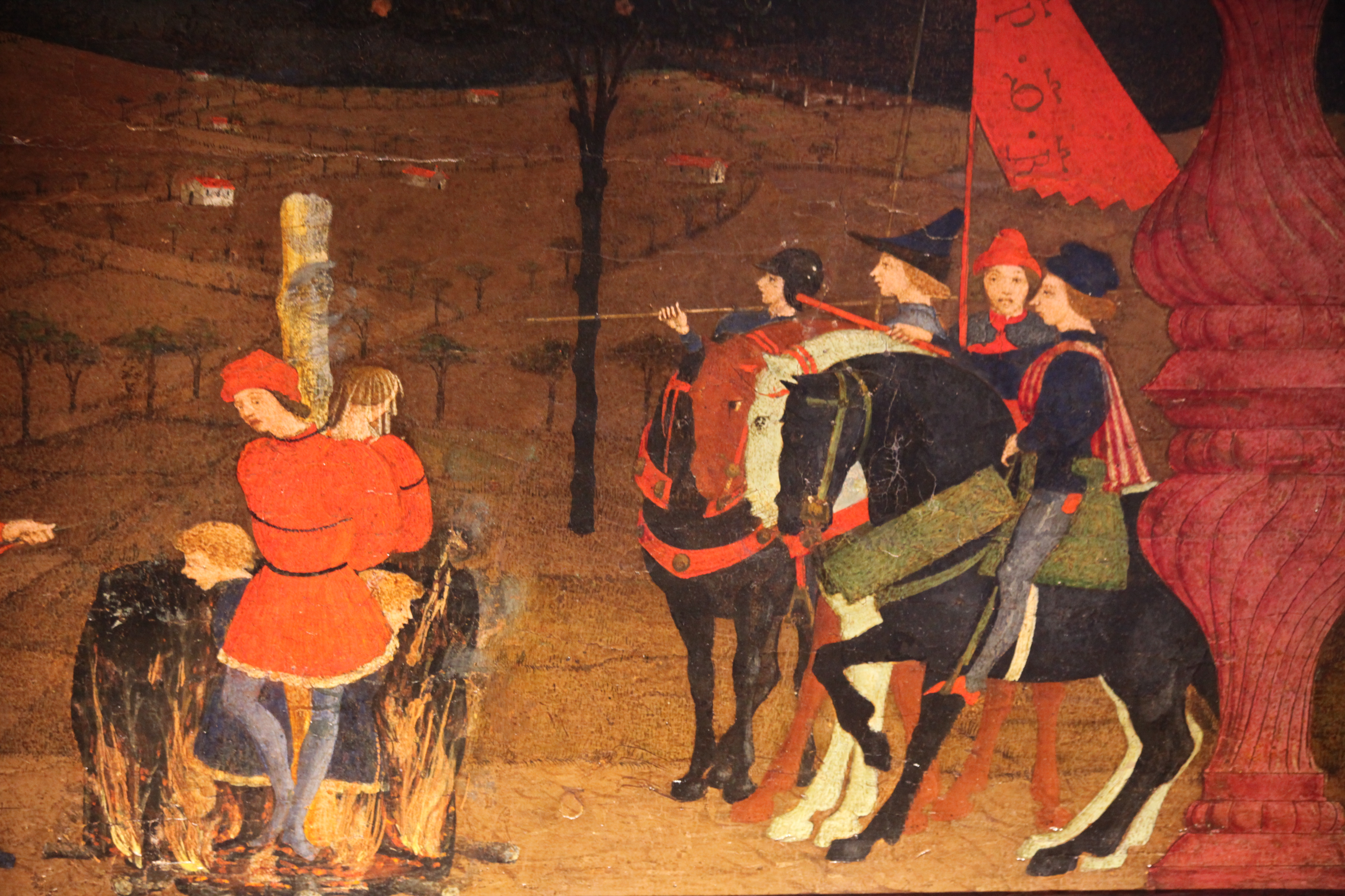 Palazzo Ducale di Urbino - Galleria Nazionale delle Marche - MIBAC This is a photo of a monument which is part of cultural heritage of Italy.